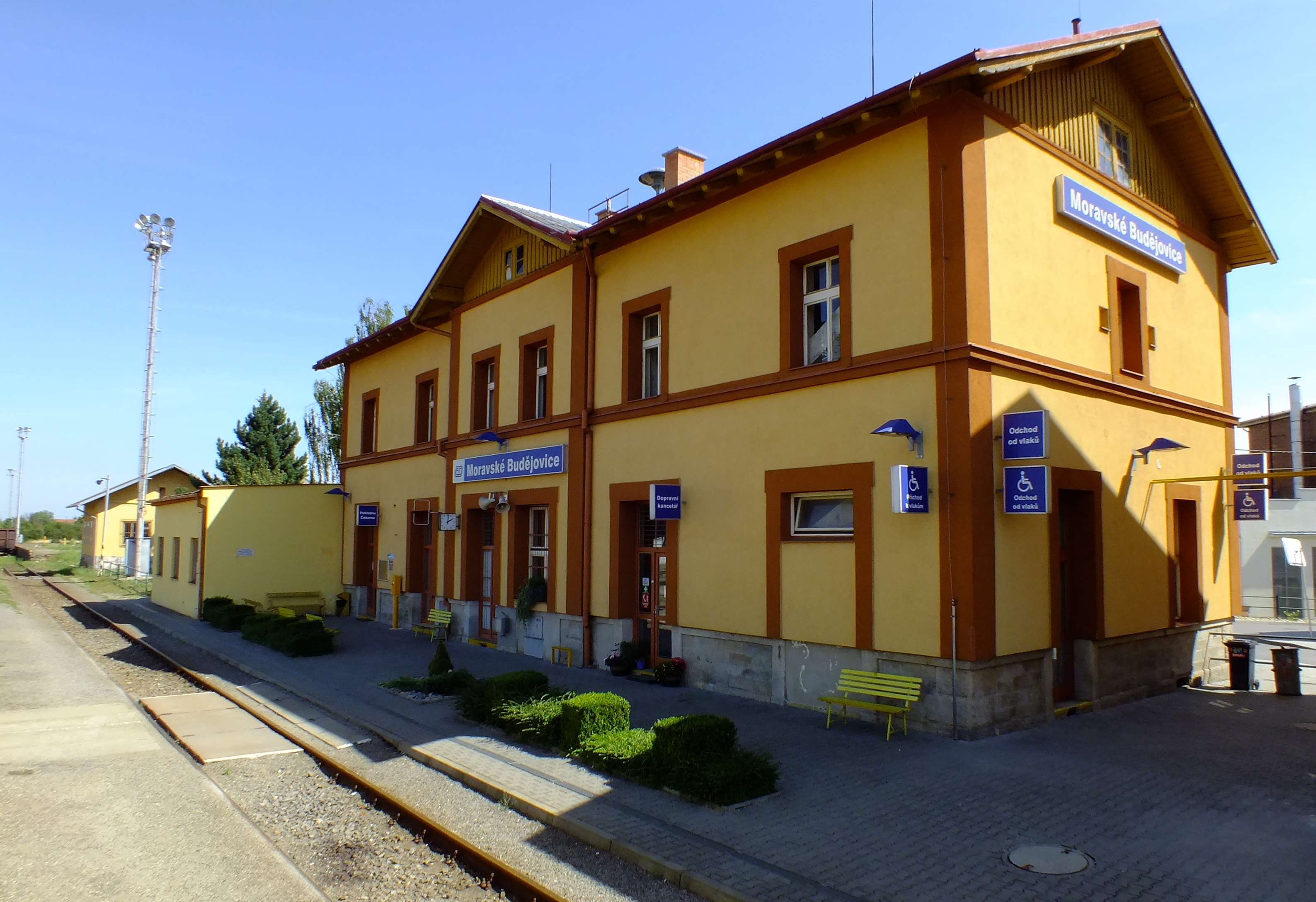 Staniční budova